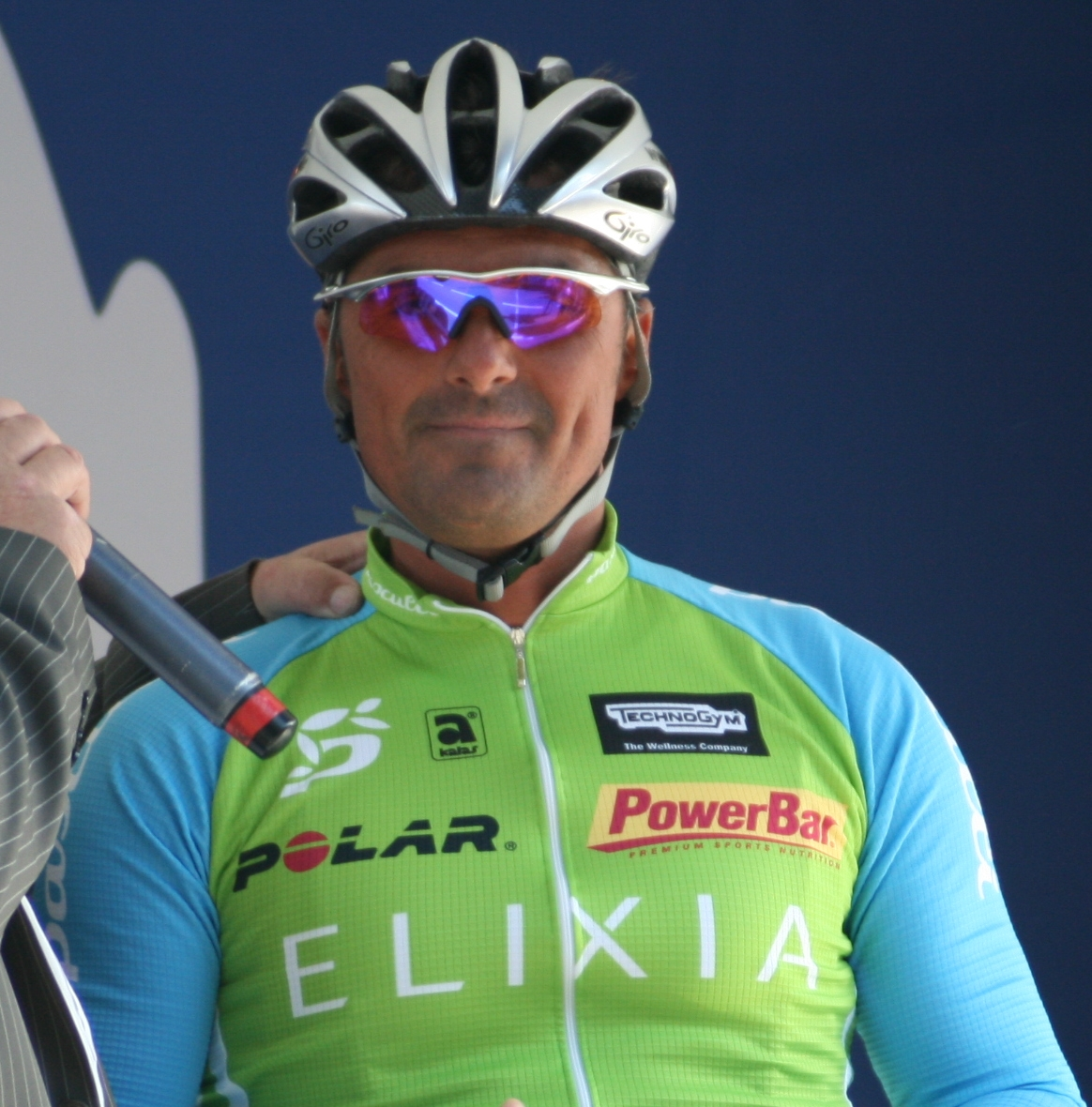 Andreas Kappes, à la Roue des As, à Marquette-lez-Lille (France)